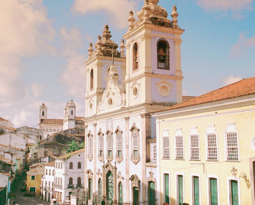 Foto do centro histórico de Salvador (Bahia, Brasil), mais conhecido como Pelourinho. Photo of the historical center of Salvador (Bahia, Brazil), more known as "Pelourinho".